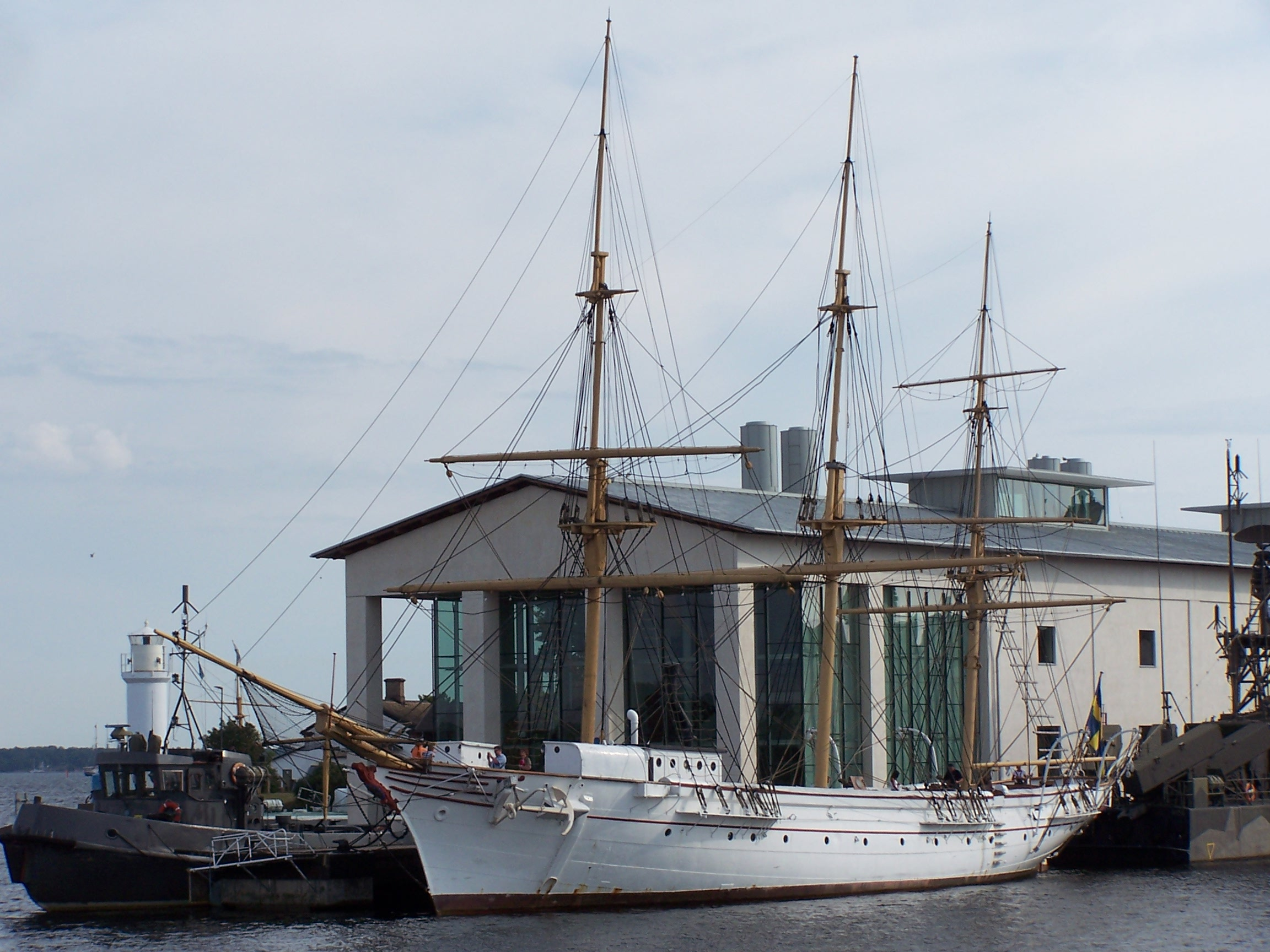 Fartyget Jarramas vid Marinmuseum i juli 2004